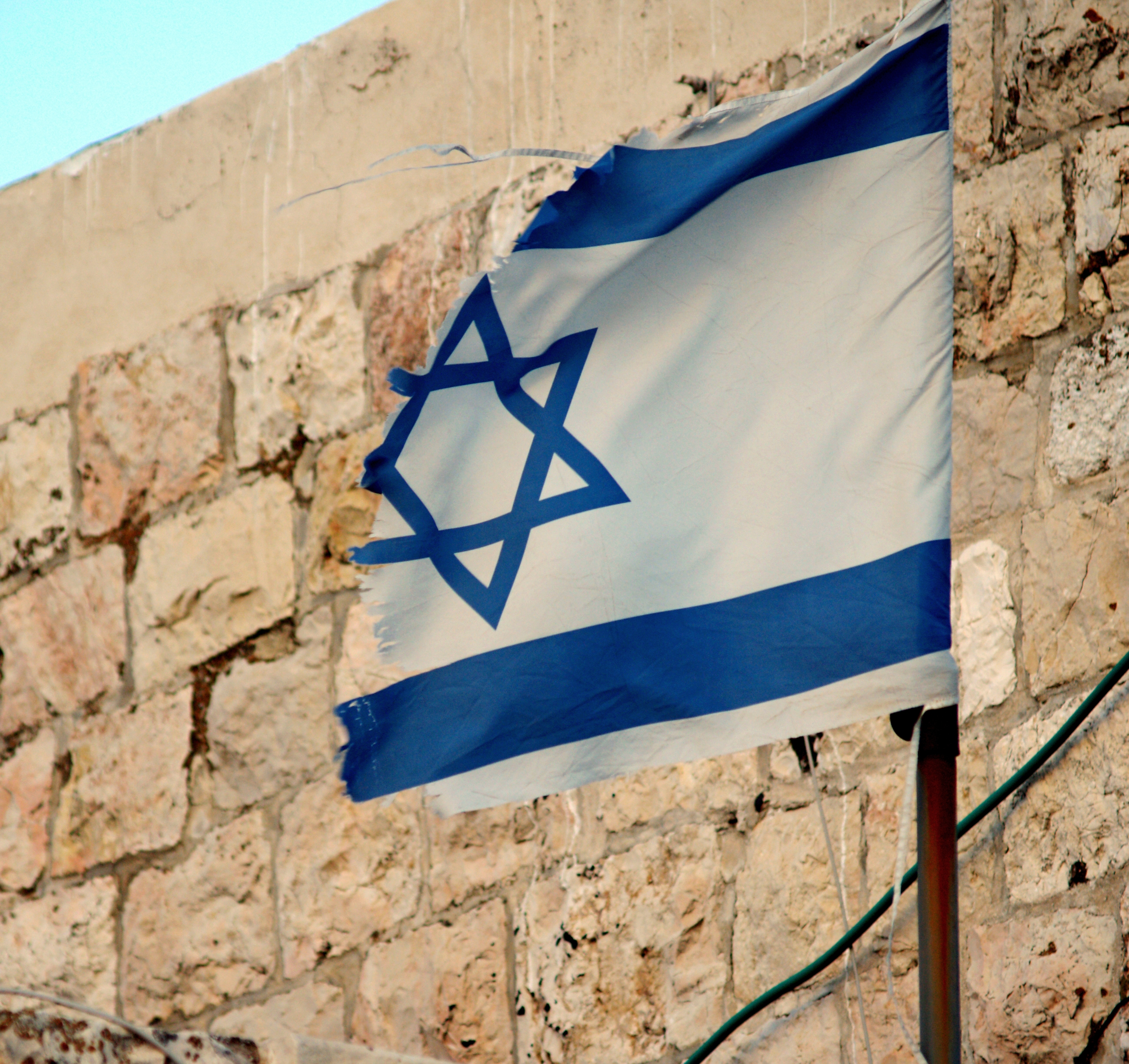 Tattered Israeli flag in Jerusalem by David Shankbone